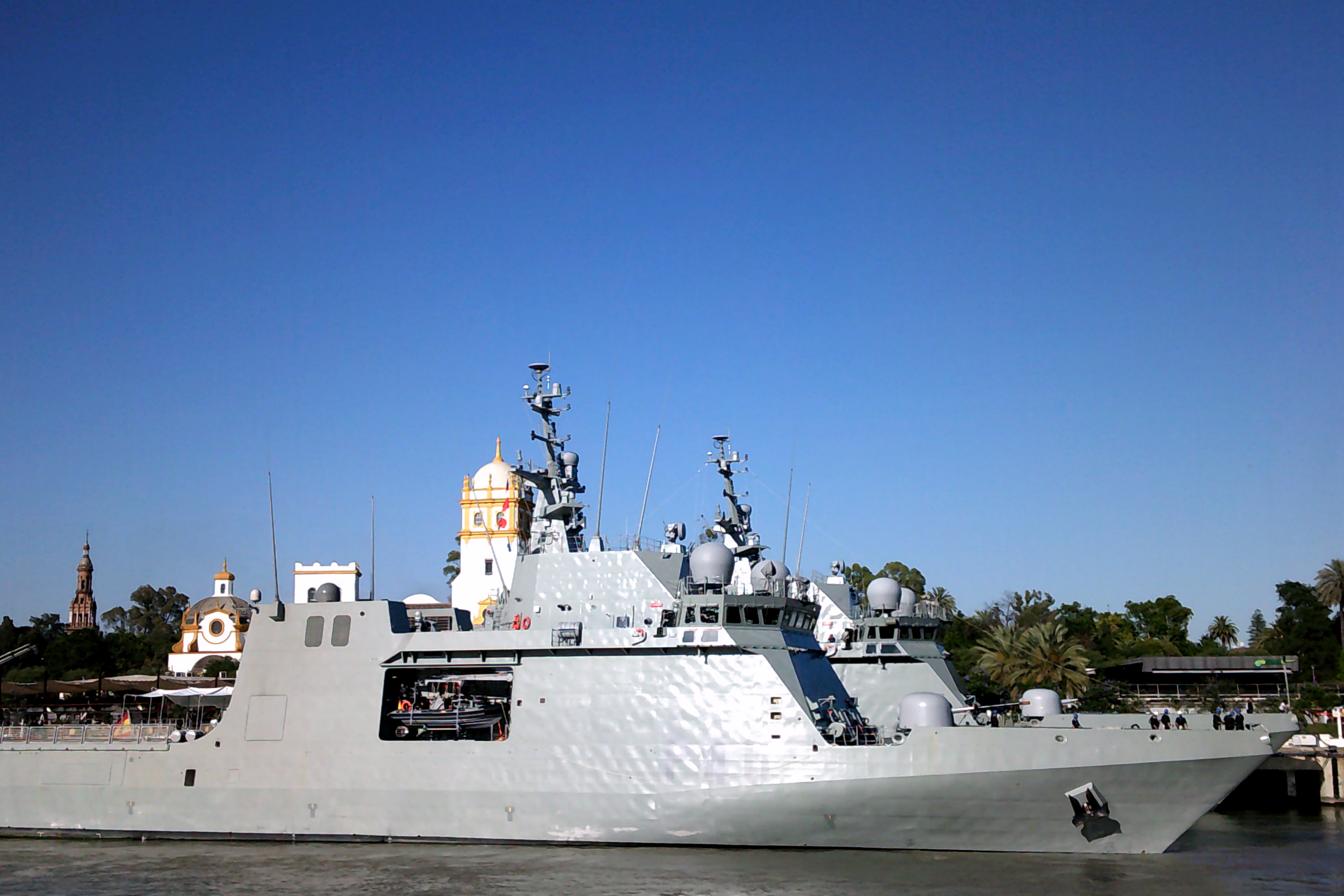 Furor (P46). Sevilla, Andalucía, España.